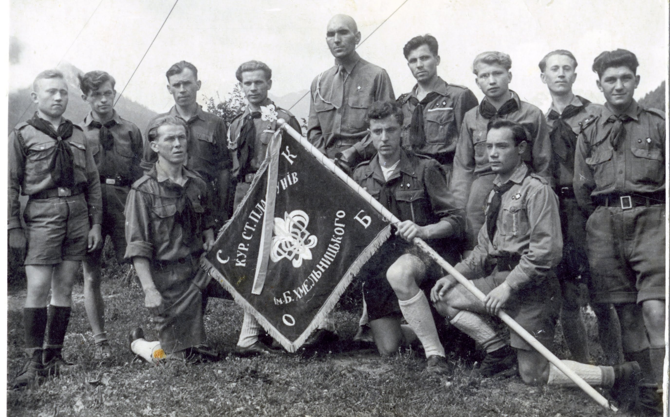 Посвята першого прапора Хмельниченків